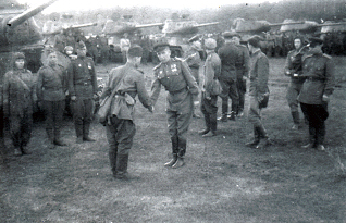 Фотография сделана кем-то из офицеров штаба 96-ой танковой бригады перед началом Курской битвы. Генерал Лебедев В.Г на втором плане в центральной группе. Фотография впервые была опубликована в газете "Дуэль" №29 2008 года для иллюстрации статьи Лебедева Н.В. "Этих дней не смолкнет слава". Однако, скорее это 1944 год, так как на заднем плане явно Т-34-85